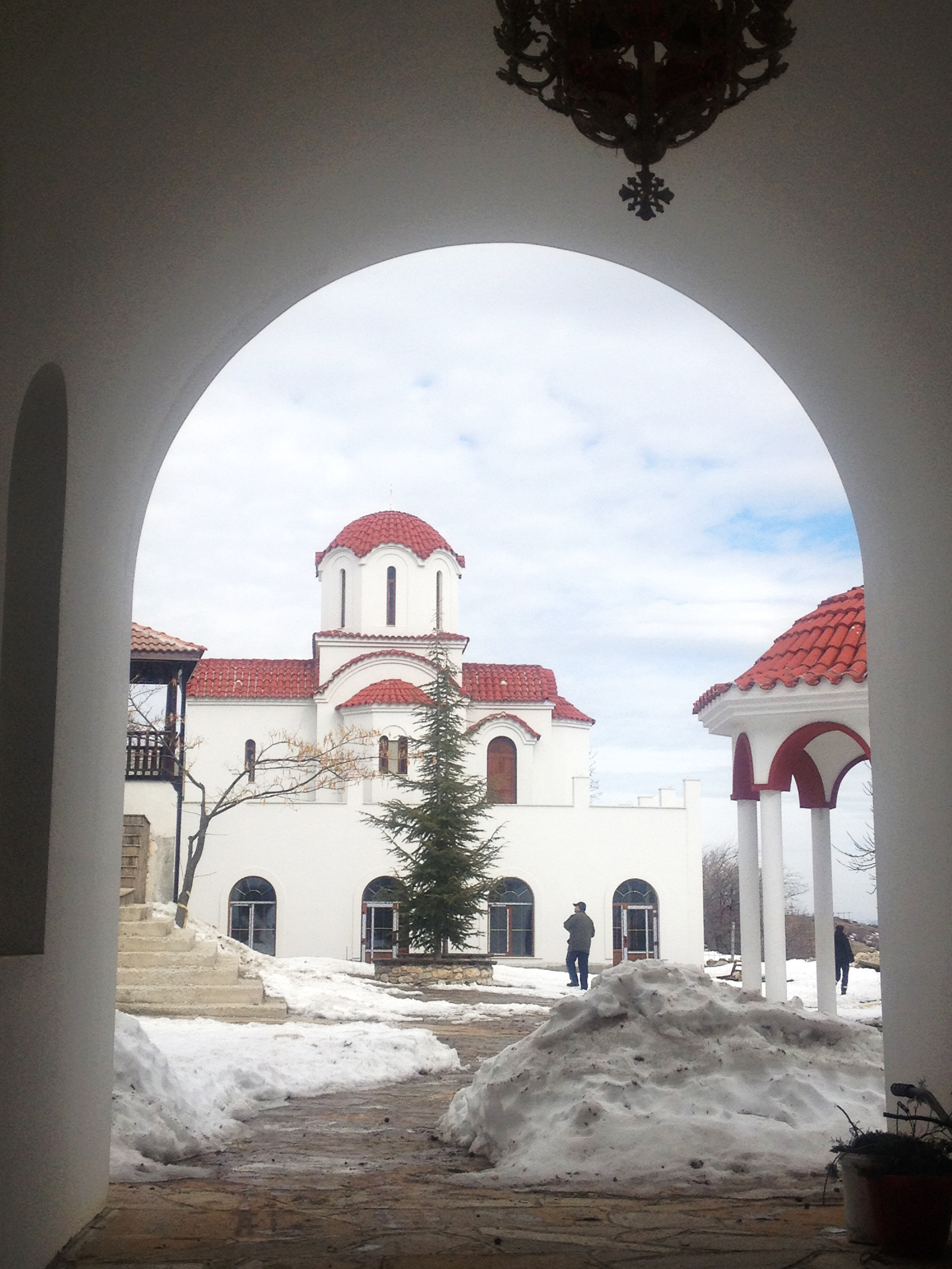 Кукленски манастир